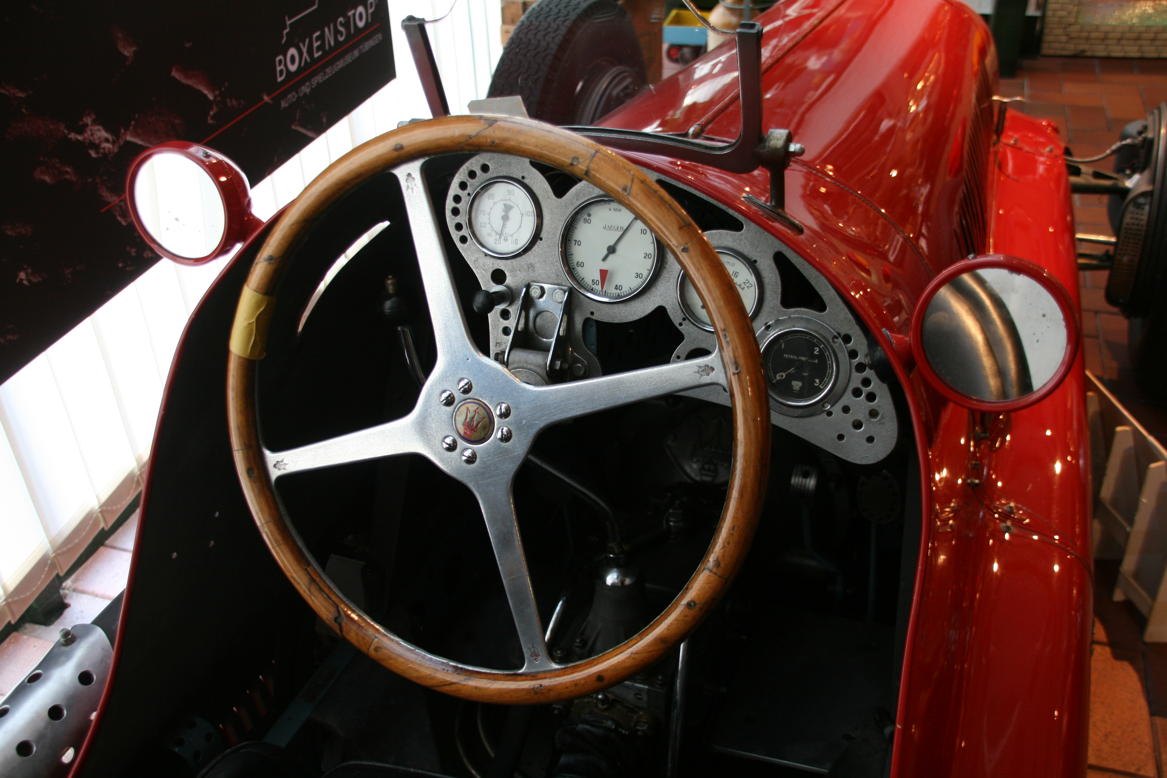 Maserati 4CL im Boxenstop Tübingen